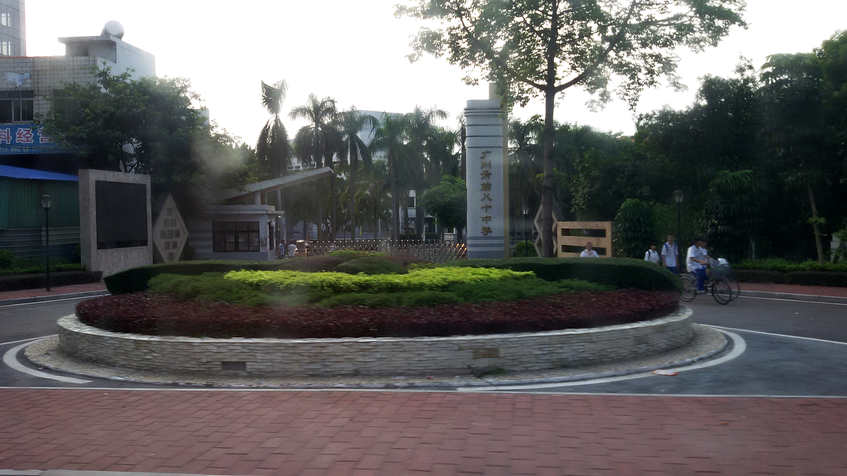 粵語: 廣州市第80中學